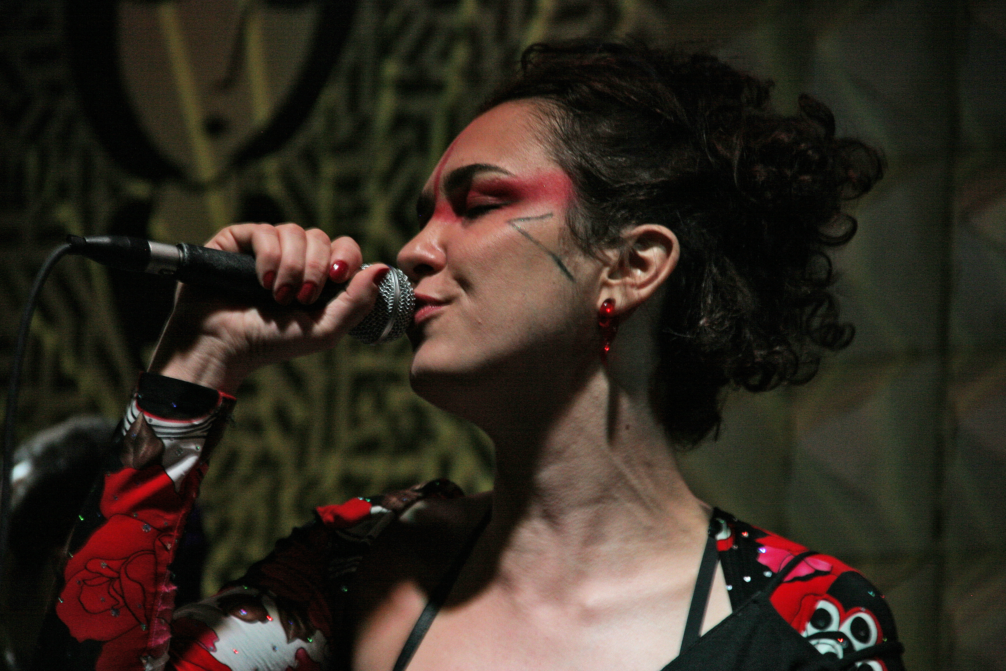 C&S com Andreia Dias e Danilo Moraes Fotos por Marcello Orsi - Data: 30/08